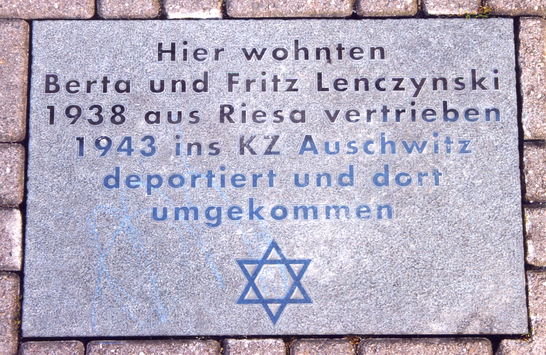 Gedenktafel in der Riesaer Fußgängerzone für die aus Riesa nach Auschwitz deportierte Familie Lenczyinski